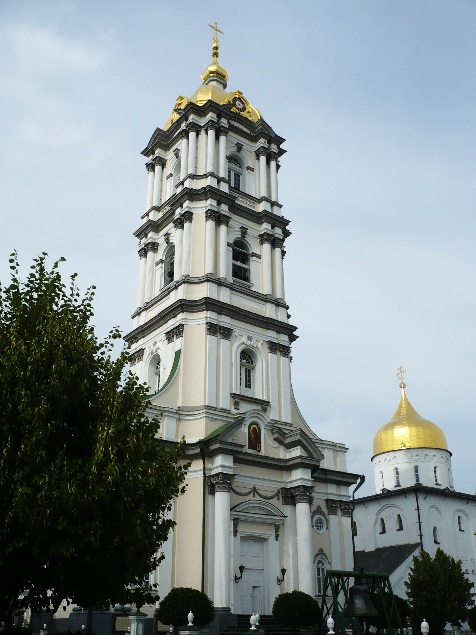 Ławra Poczajowska